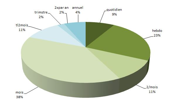 relevé de la frequence des chargements de données en 2014